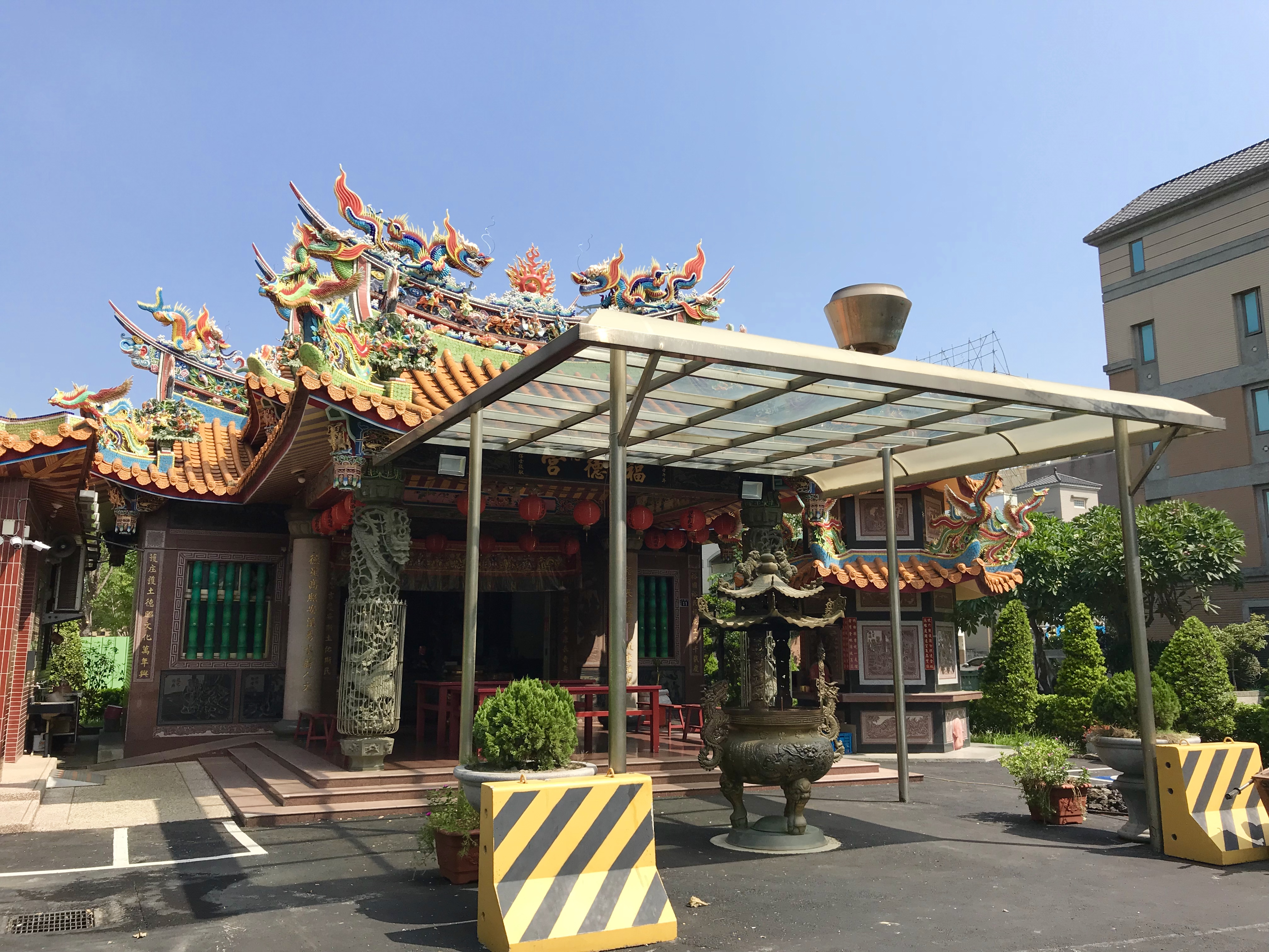 中文（台灣）: 文化福德宮斜照